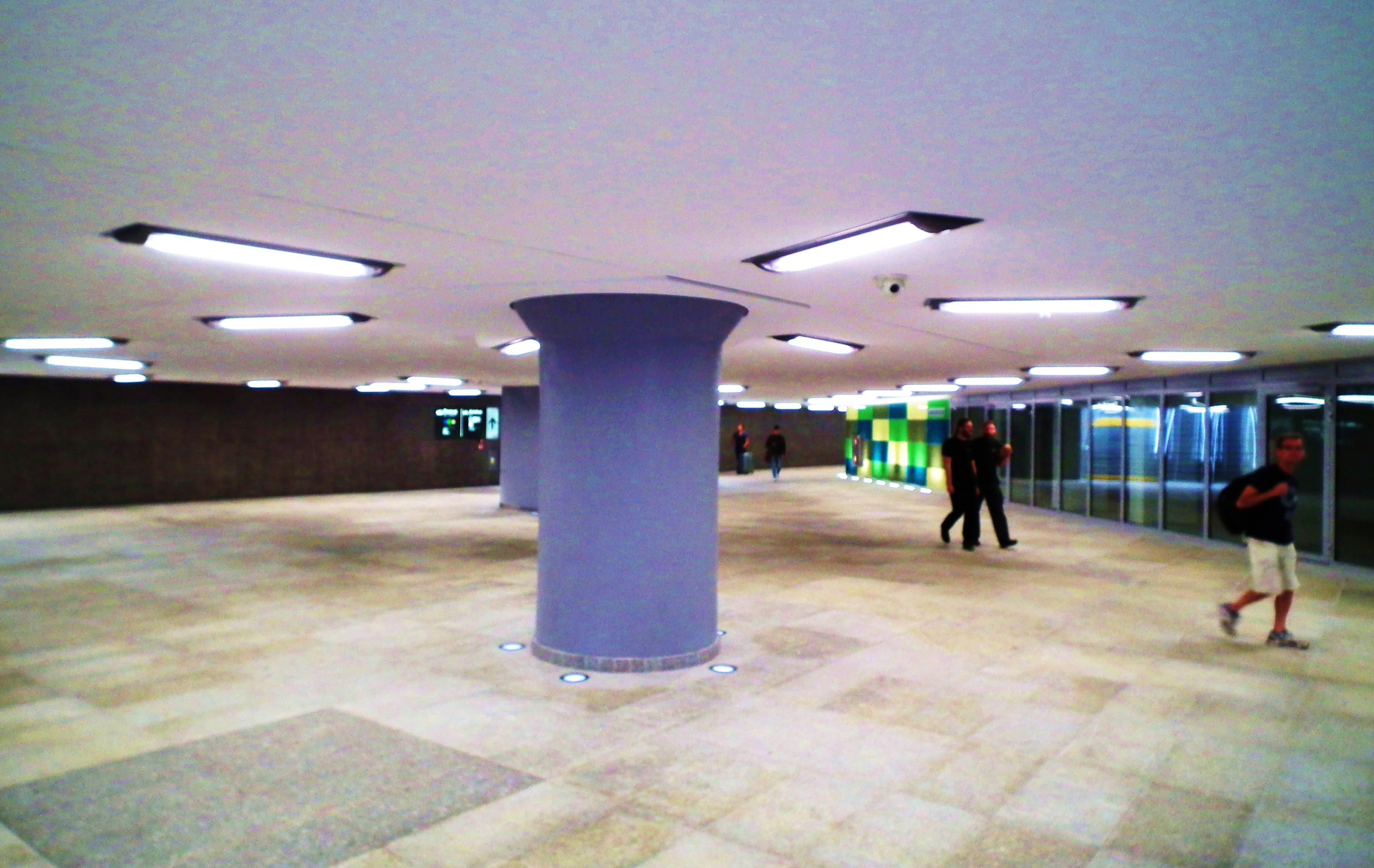 Rondo Kaponiera w Poznaniu po otwarciu we wrześniu 2016r. Przejścia podziemne.